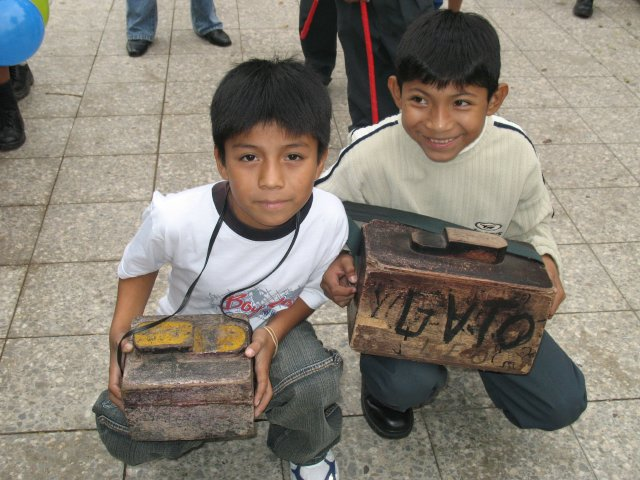 En los barrios marginales de Peru.